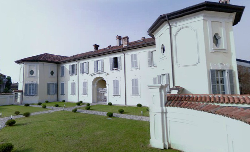 Villa Clari Monzini a Corbetta (MI) - Italy